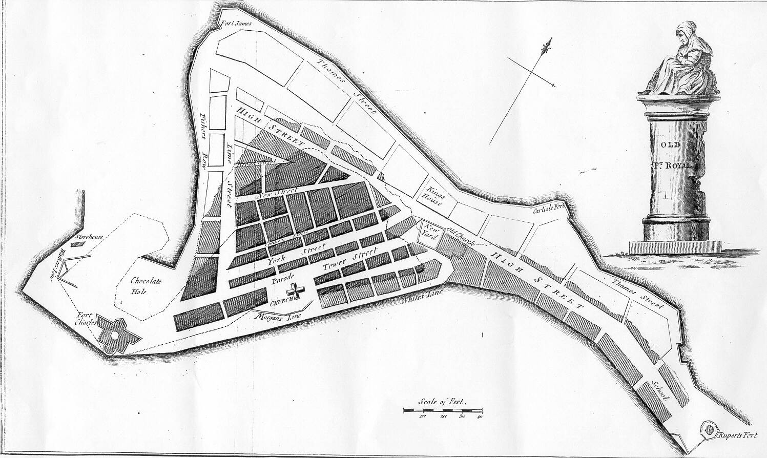 Oude kaart Port Royal (Jamaica)